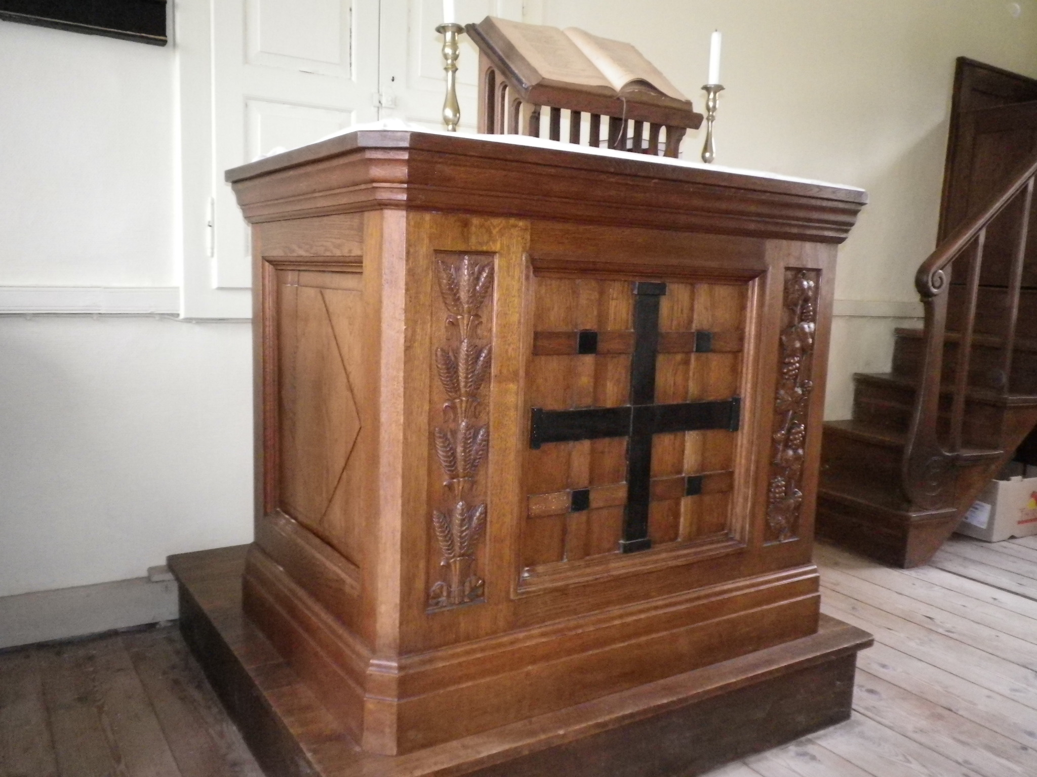 Au centre une grande croix de Jérusalem avec la croix centrale noire et de chaque côté les symboles des éléments de la cène : à gauche, des épis et à droite des grappes de raisin.